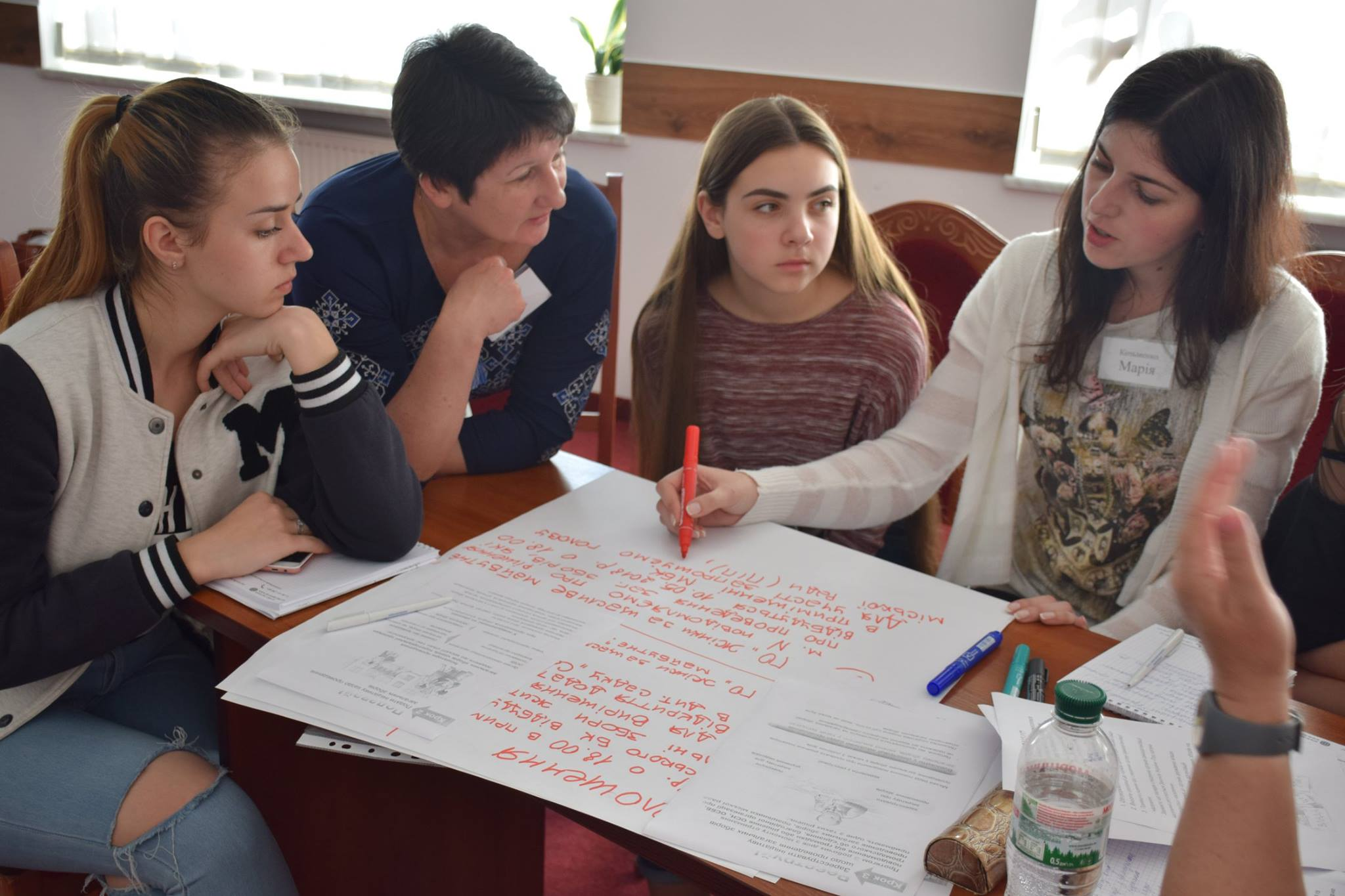 Тренінг "Громадянська освіта жінок місцевих громад", 2 група (26-28 квітня, м. Львів-Брюховичі)